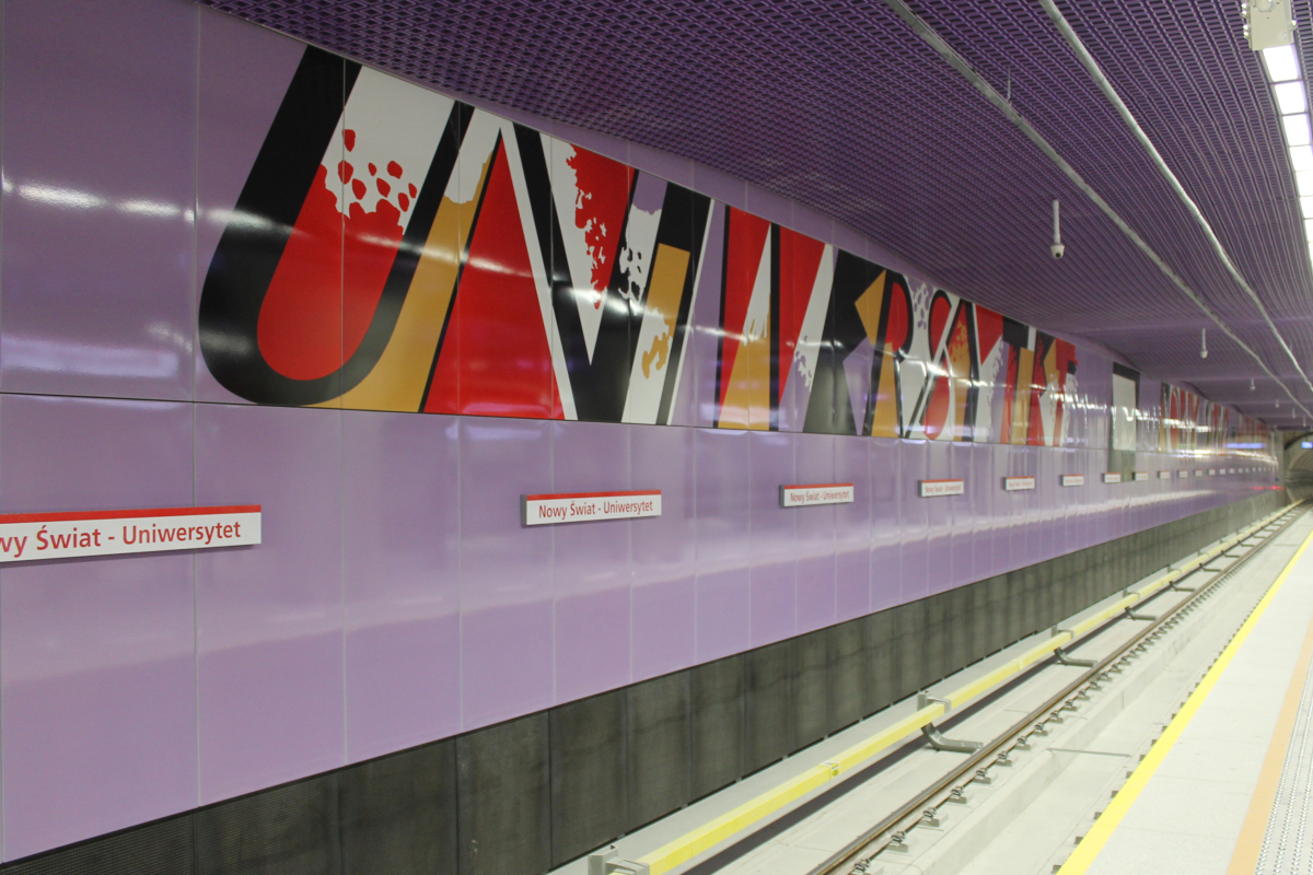 Ściana zatorowa na stacji C12 Nowy Świat-Uniwersytet. - Opracowanie graficzne Wojciech Fangor